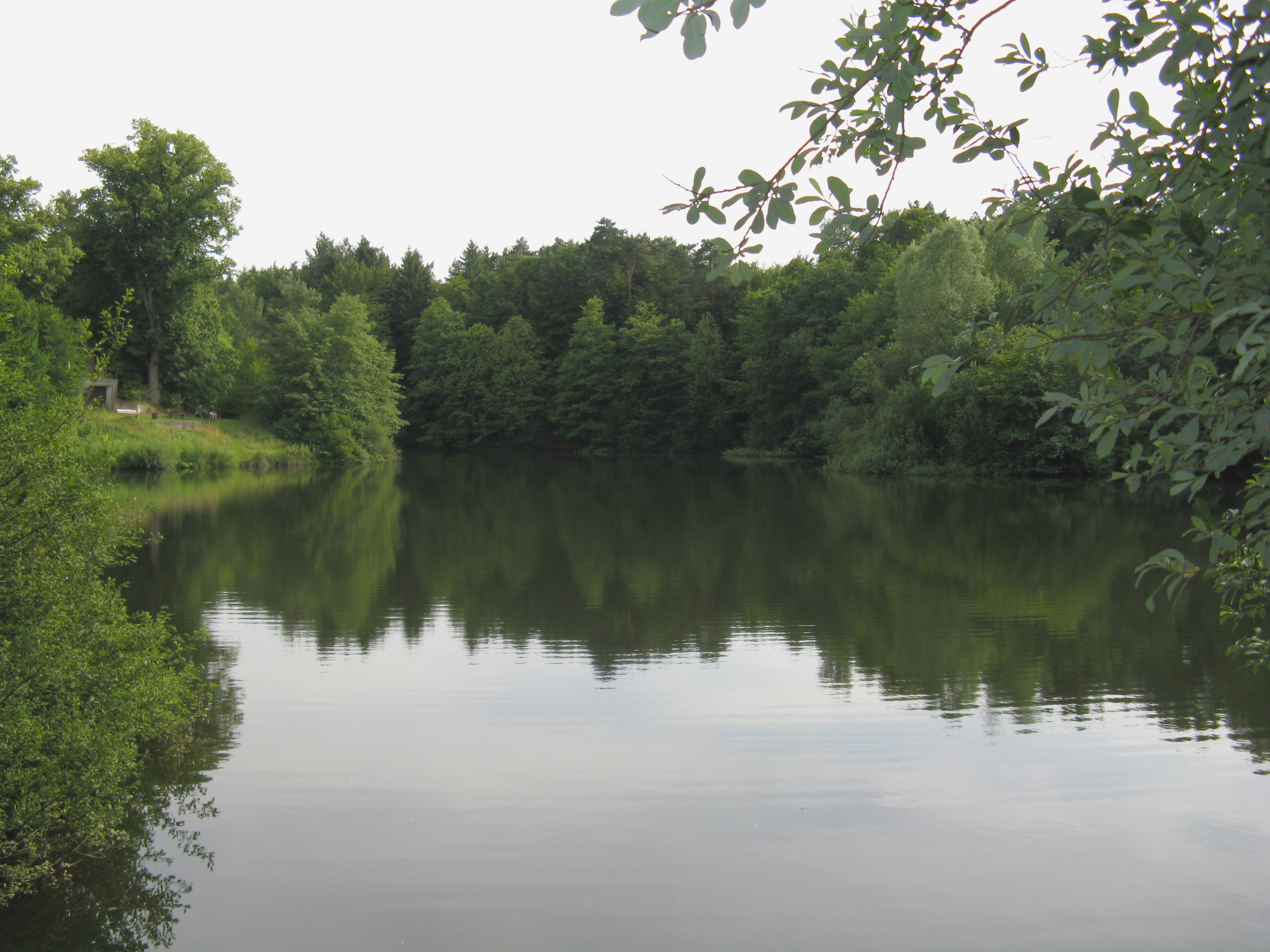 Der Hasselbachstausee